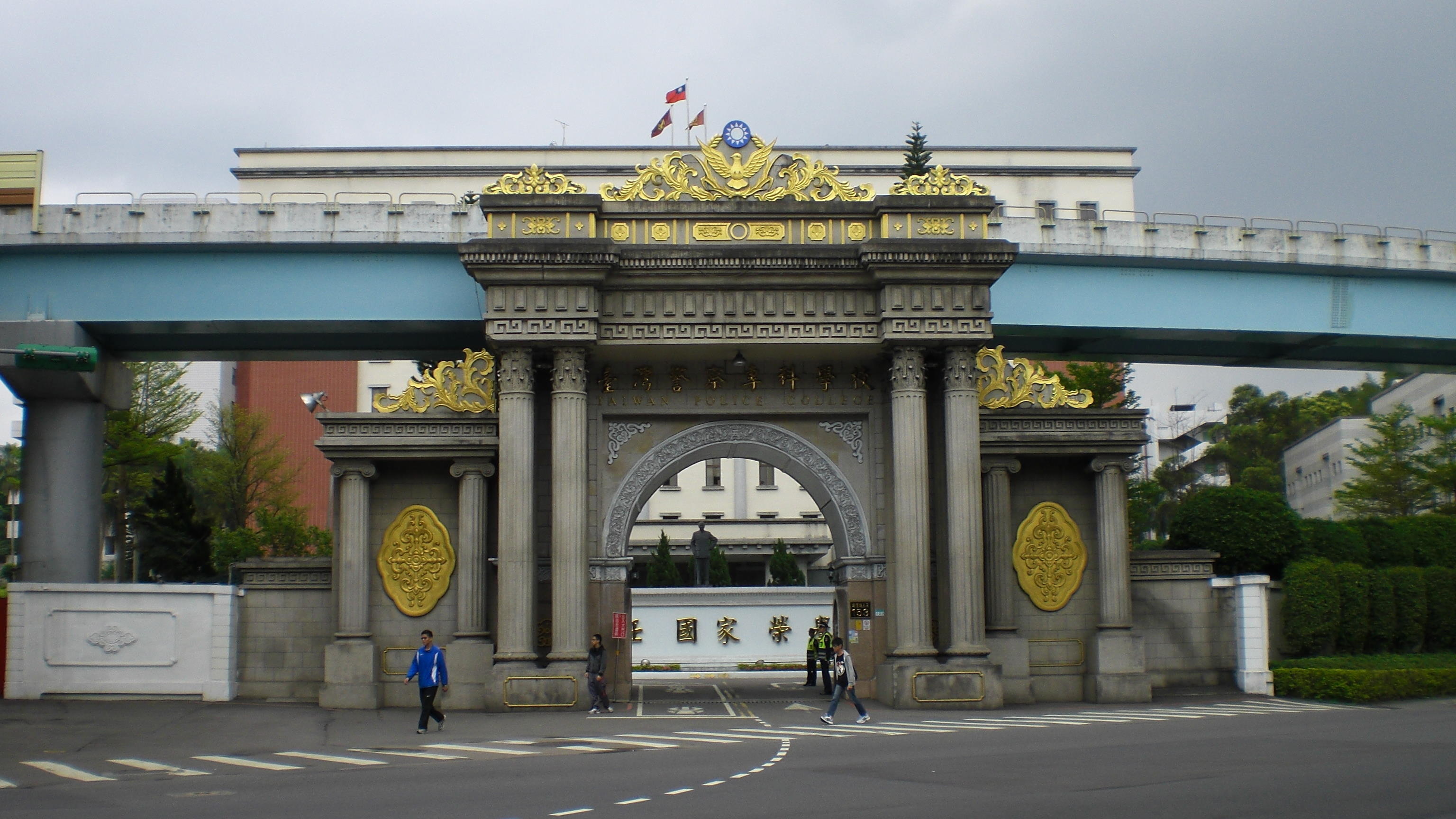 臺灣警察專科學校大門與臺北捷運文湖線高架軌道。